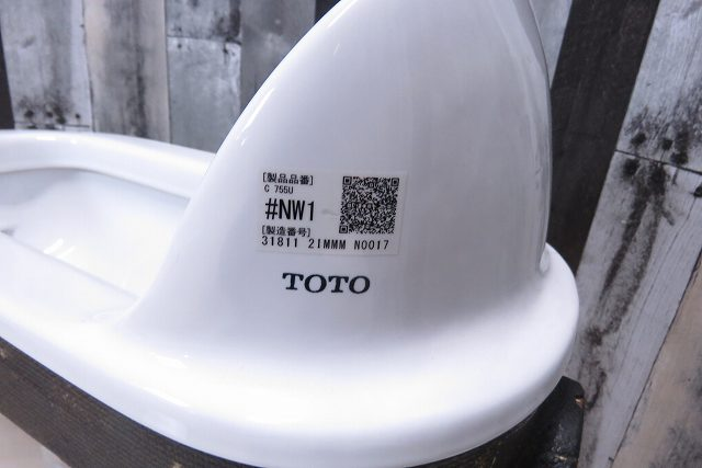 TOTO C755U